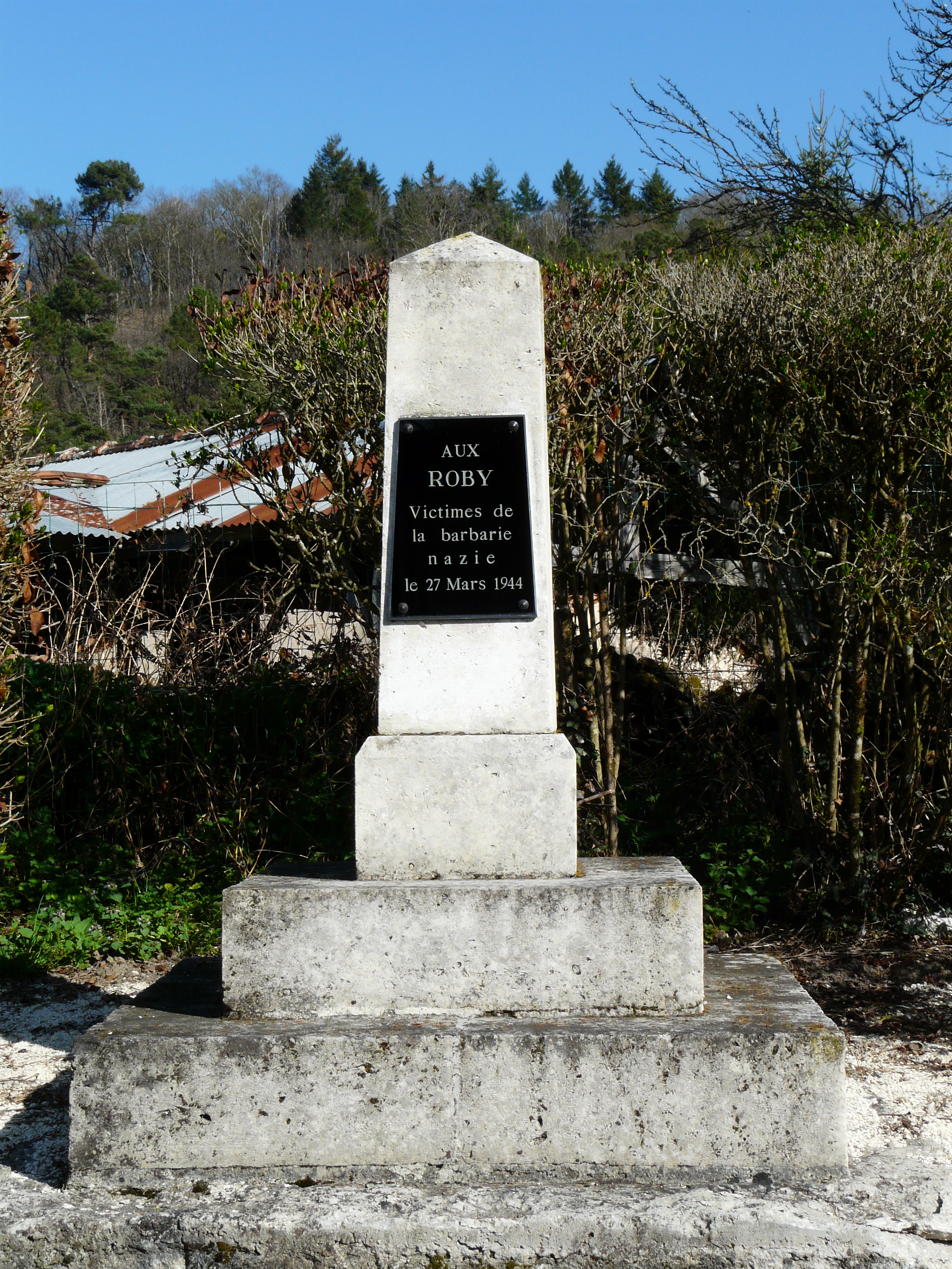 Stèle à la mémoire de la famille Roby, fusillée par les Allemands le 27 mars 1944, village de Saint-Crépin-de-Richemont, Dordogne, France.